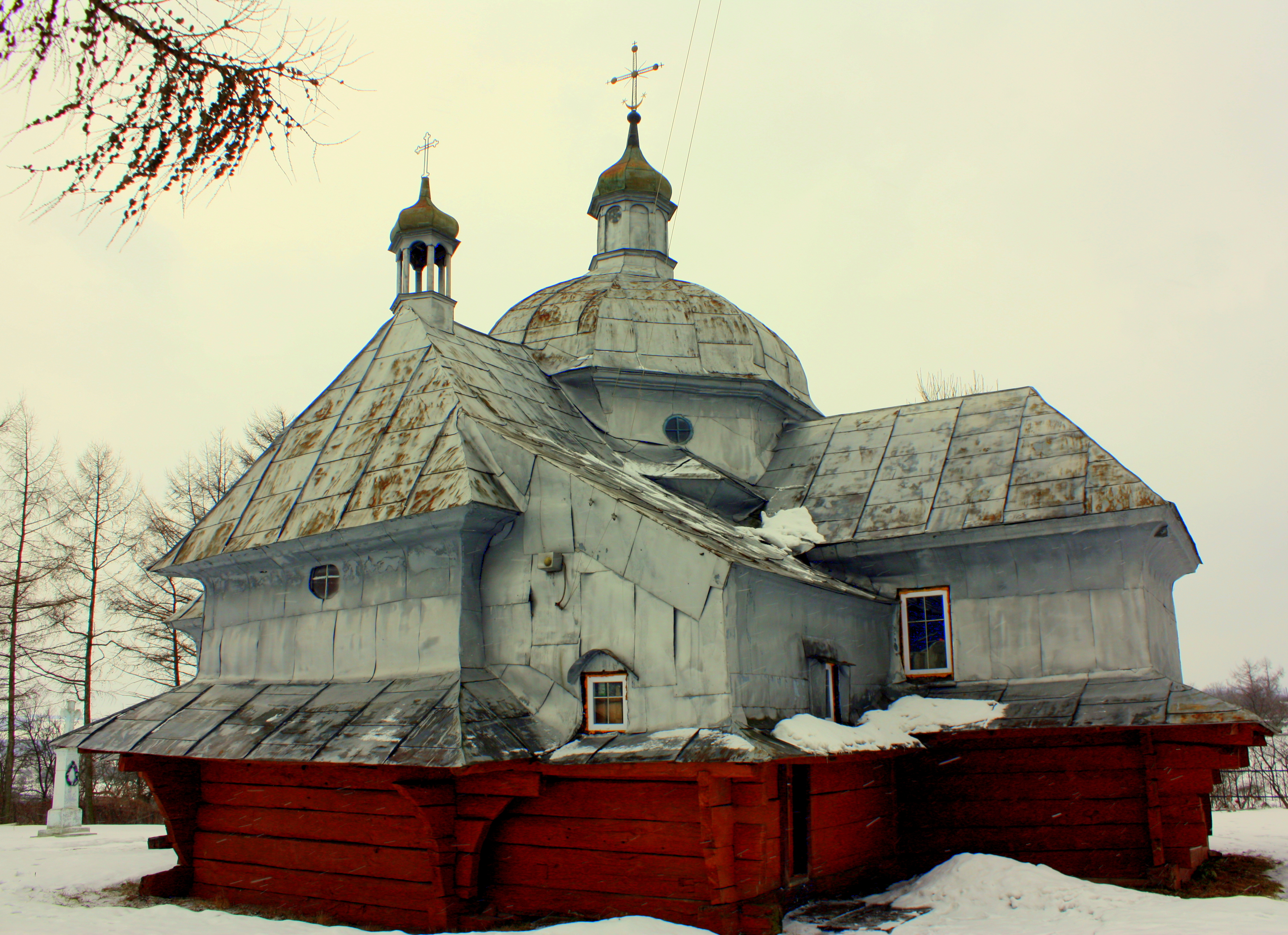 Церква Успення Пресвятої Богородиці (дер.), с. Верхобуж